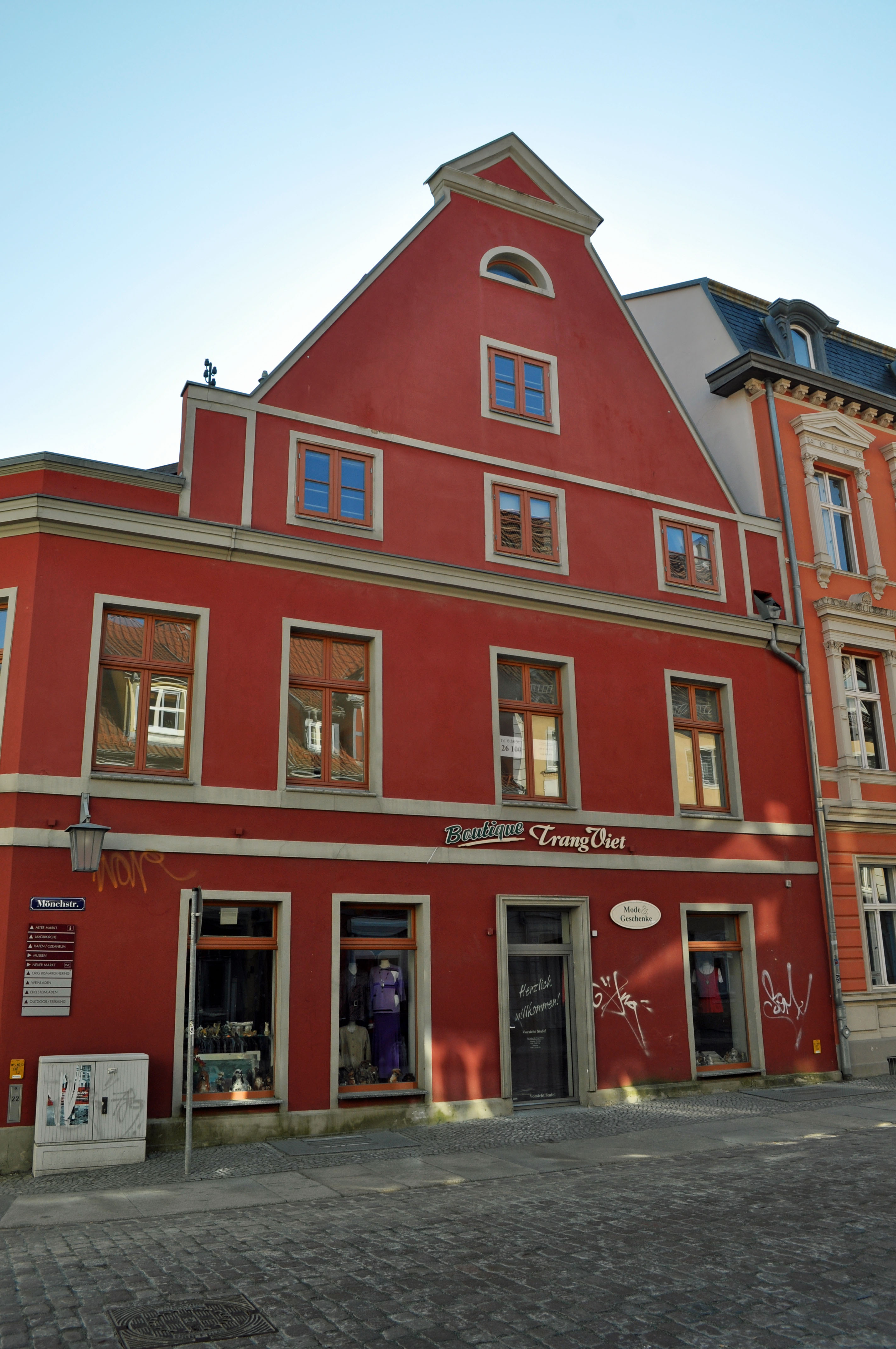 Gebäude bzw. Gebäudedetail in Stralsund. Straße und Hausnummer siehe Dateiname.